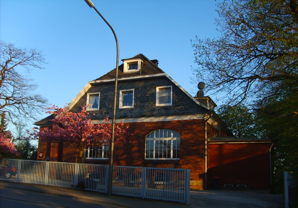 Katernberger Vereinshaus, Wuppertal, Germany